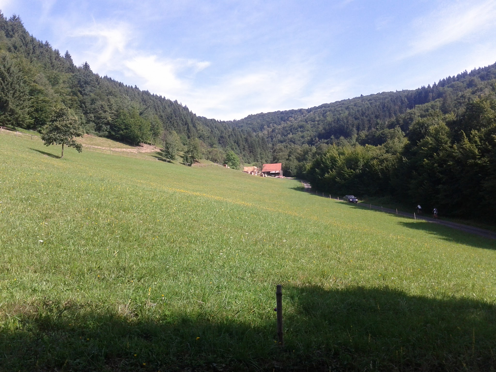 755 01 Janová, Czech Republic